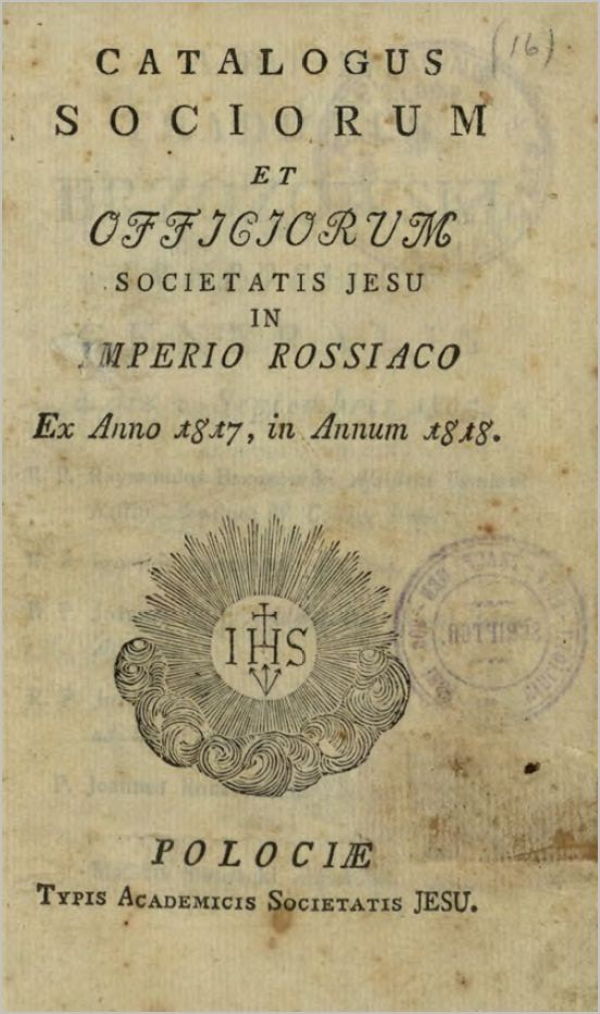 Тытульны ліст каталога Таварыства Ісуса за 1817/1818 навучальны год